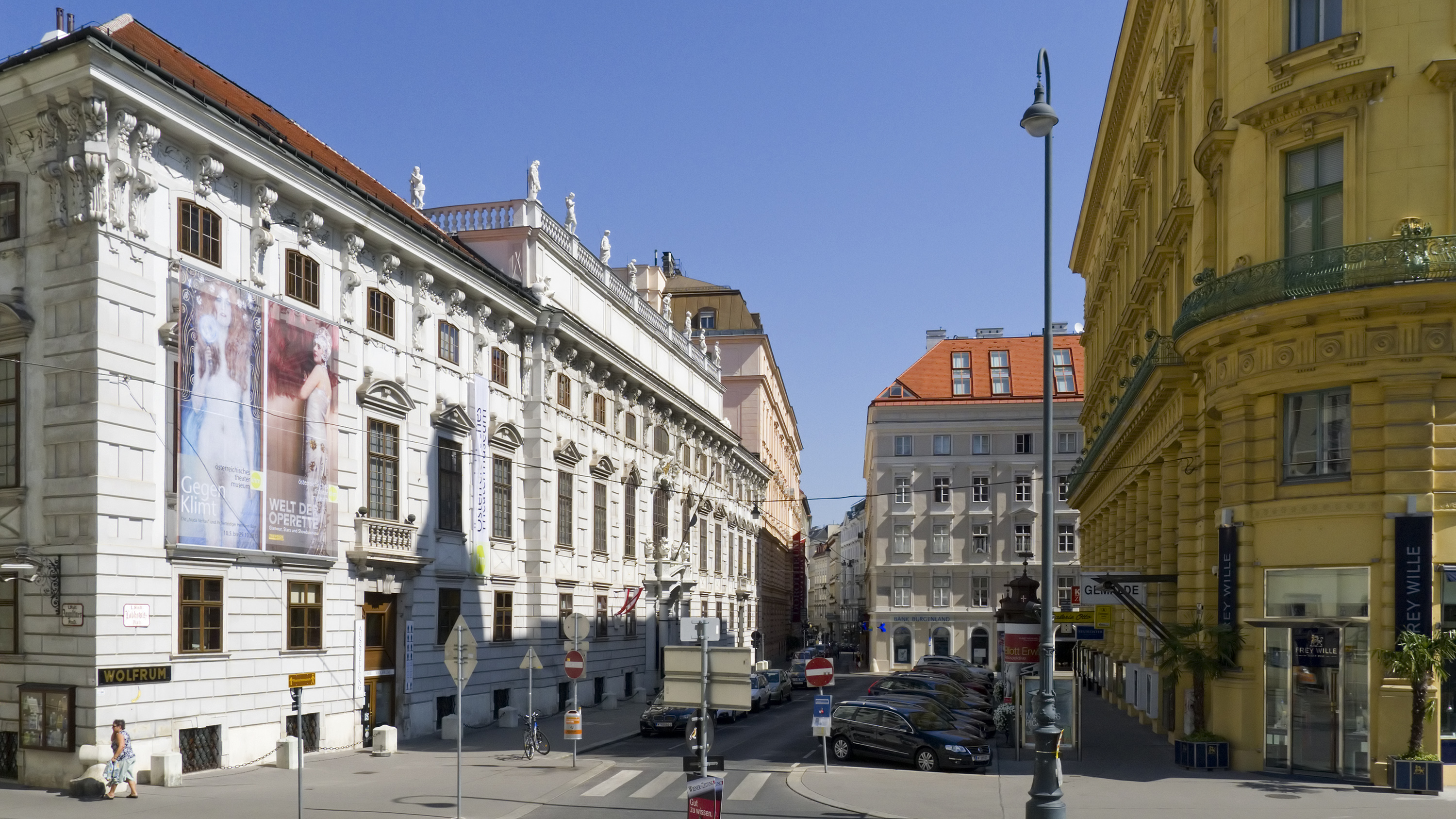 Lobkowitzplatz in Wien 1 Richtung Nordosten